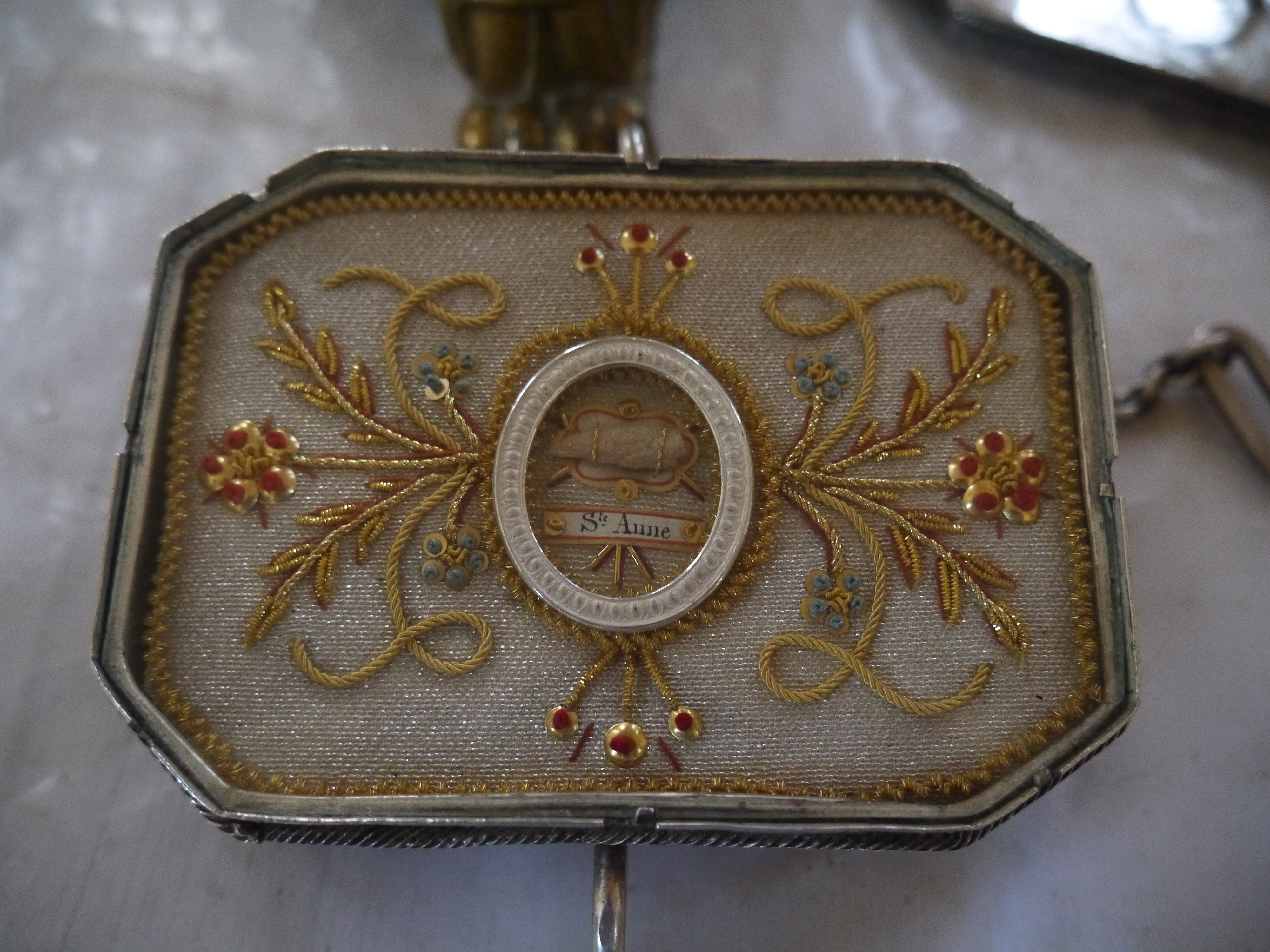 Une relique attribuée à Sainte Anne, constituée d'une phalange de l'index de la main droite.